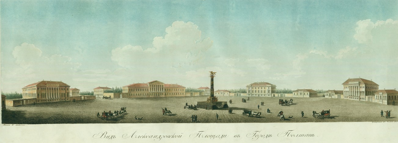 Вигляд Олександрівського майдану в Полтаві.